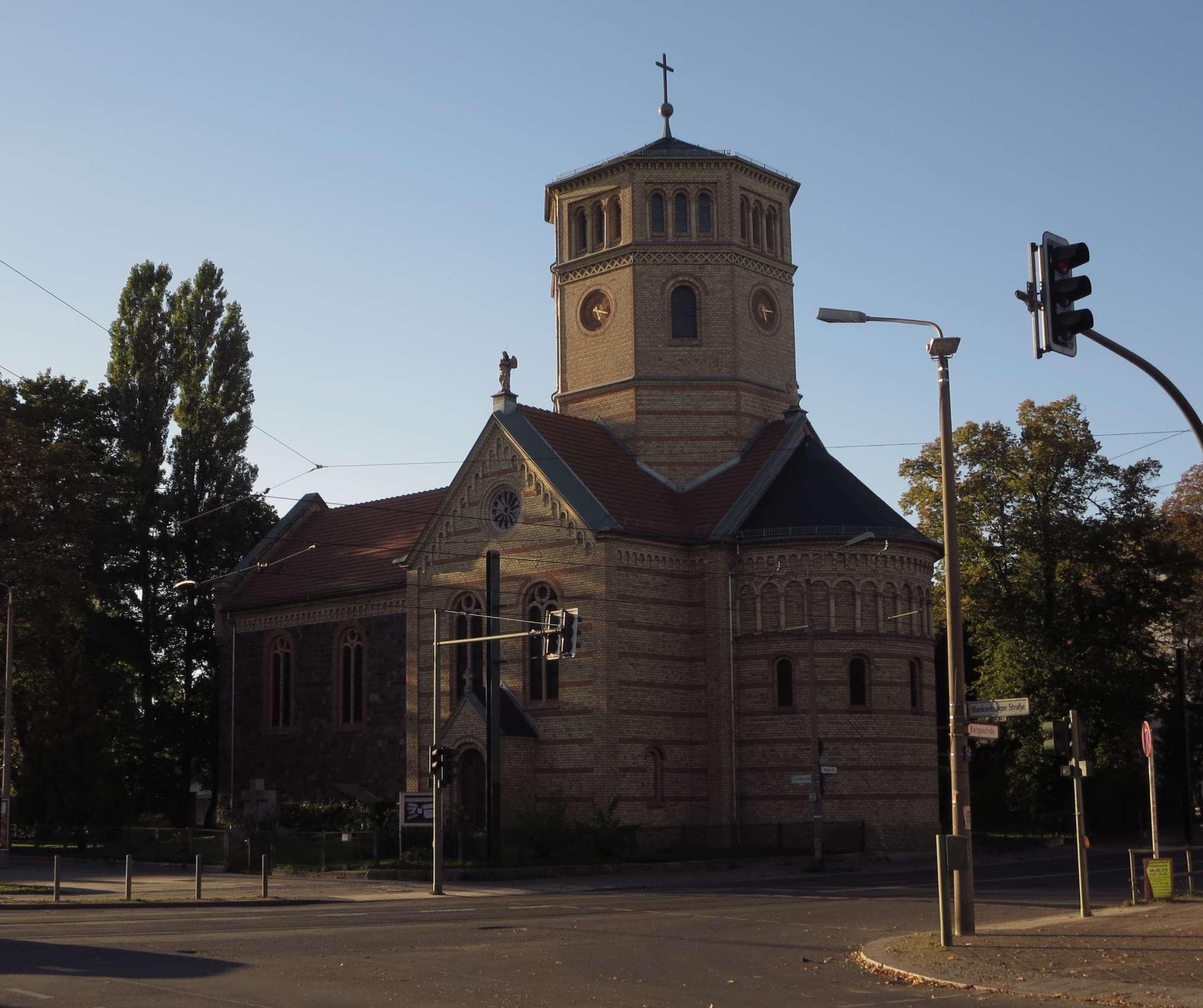 Friedenskirche Niederschönhausen